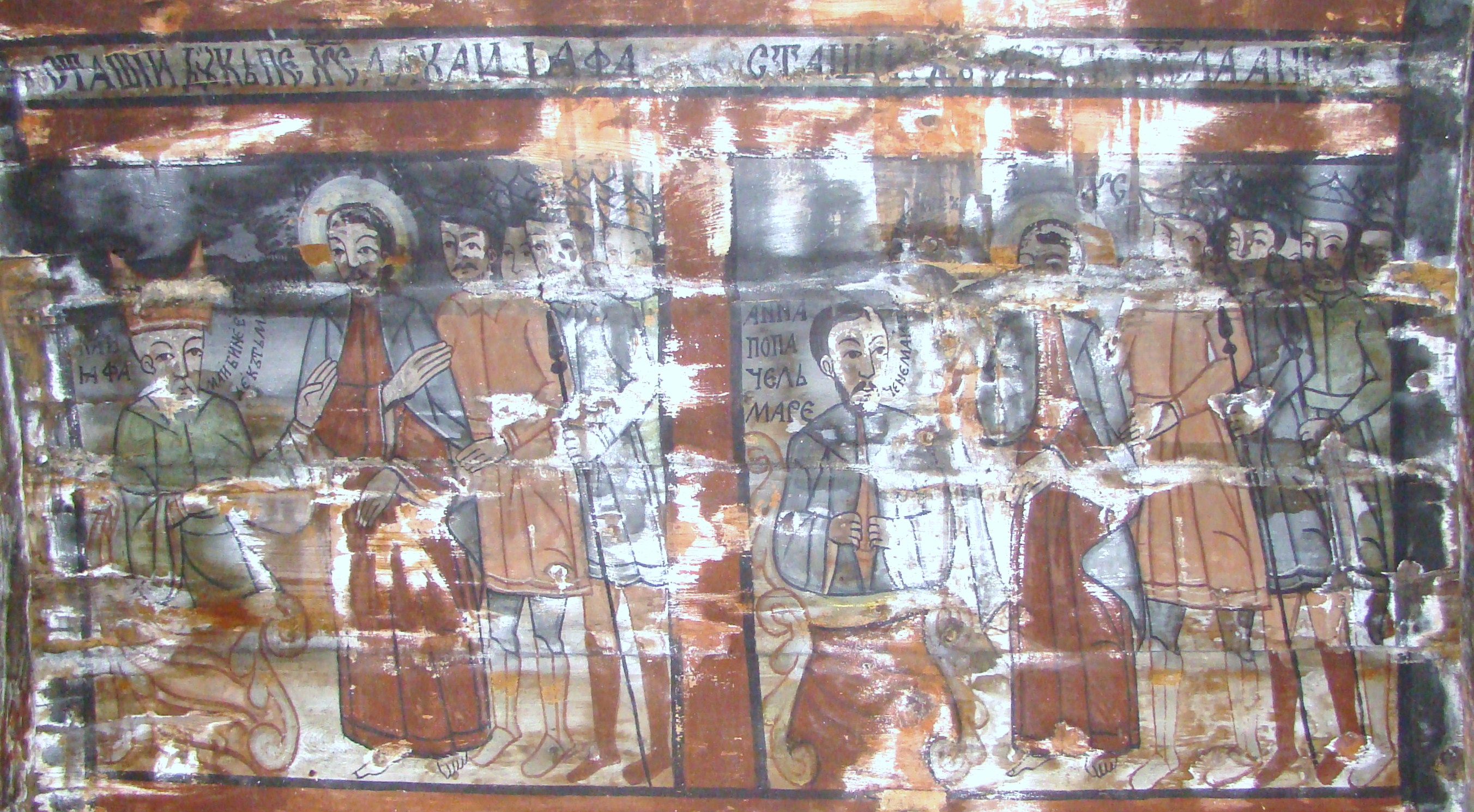 Biserica de lemn din Sărata